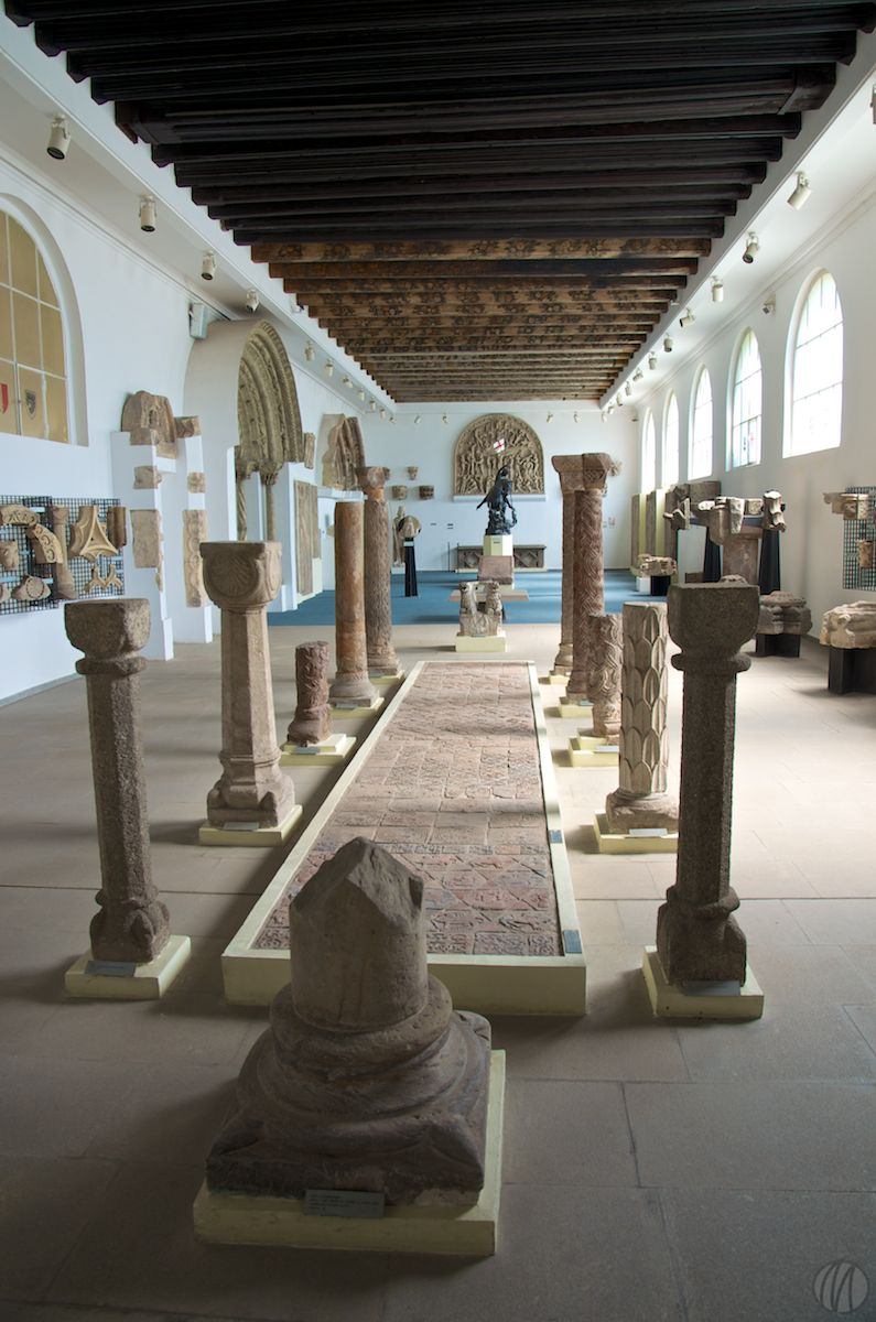 Lapidárium Národního muzea, sál románské a raně gotické plastiky.